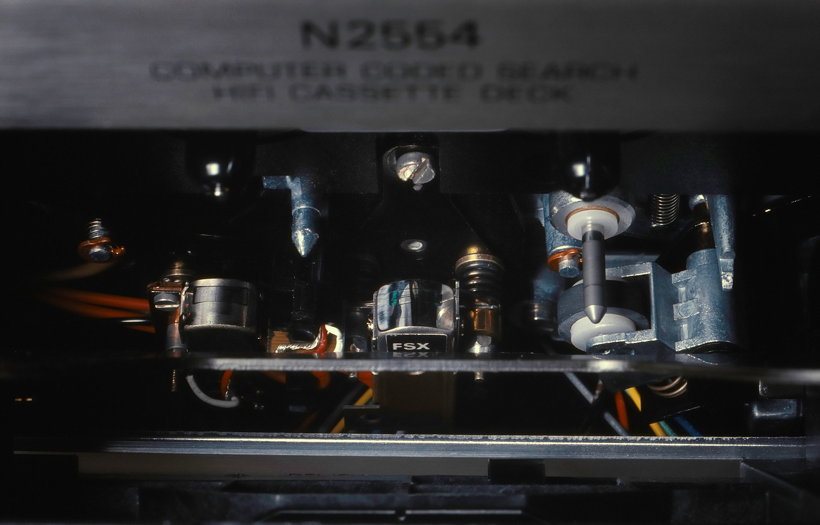 Têtes magnétiques et cabestan d'un magnétophone à cassette Philips N2554